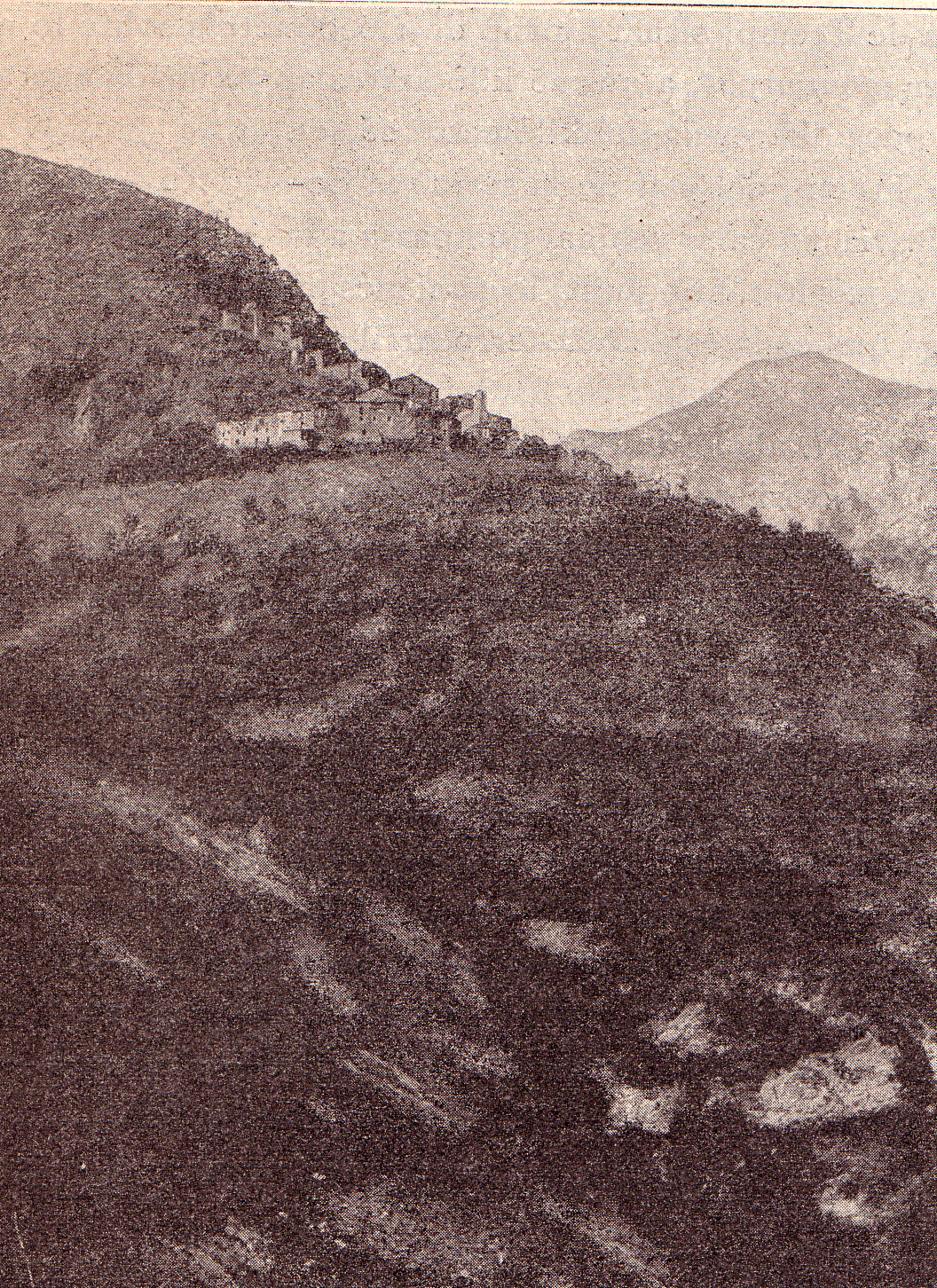 Fotografia de vers el 1915 del poble de Manyanet (Alta Ribagorça)